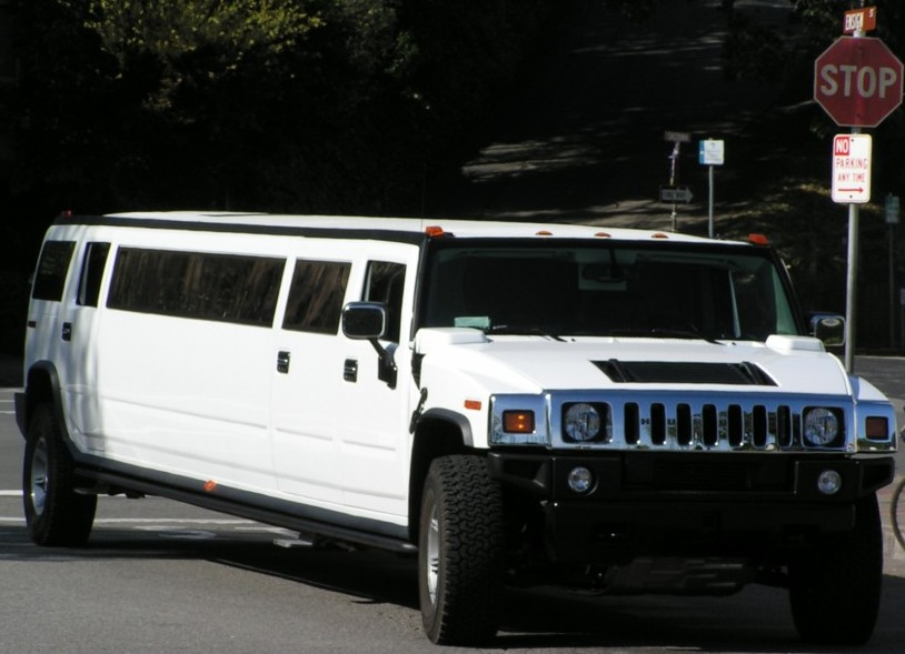 H2-Langversion eines Limousinenverleihs in Sausalito (Kalifornien)(english:Sausalito, California) Diese Version ist von der Firma Krystal und um 140 Zoll gestretcht! Hier in Deutschland gibt es Versionen bis 200 Zoll gestretcht.